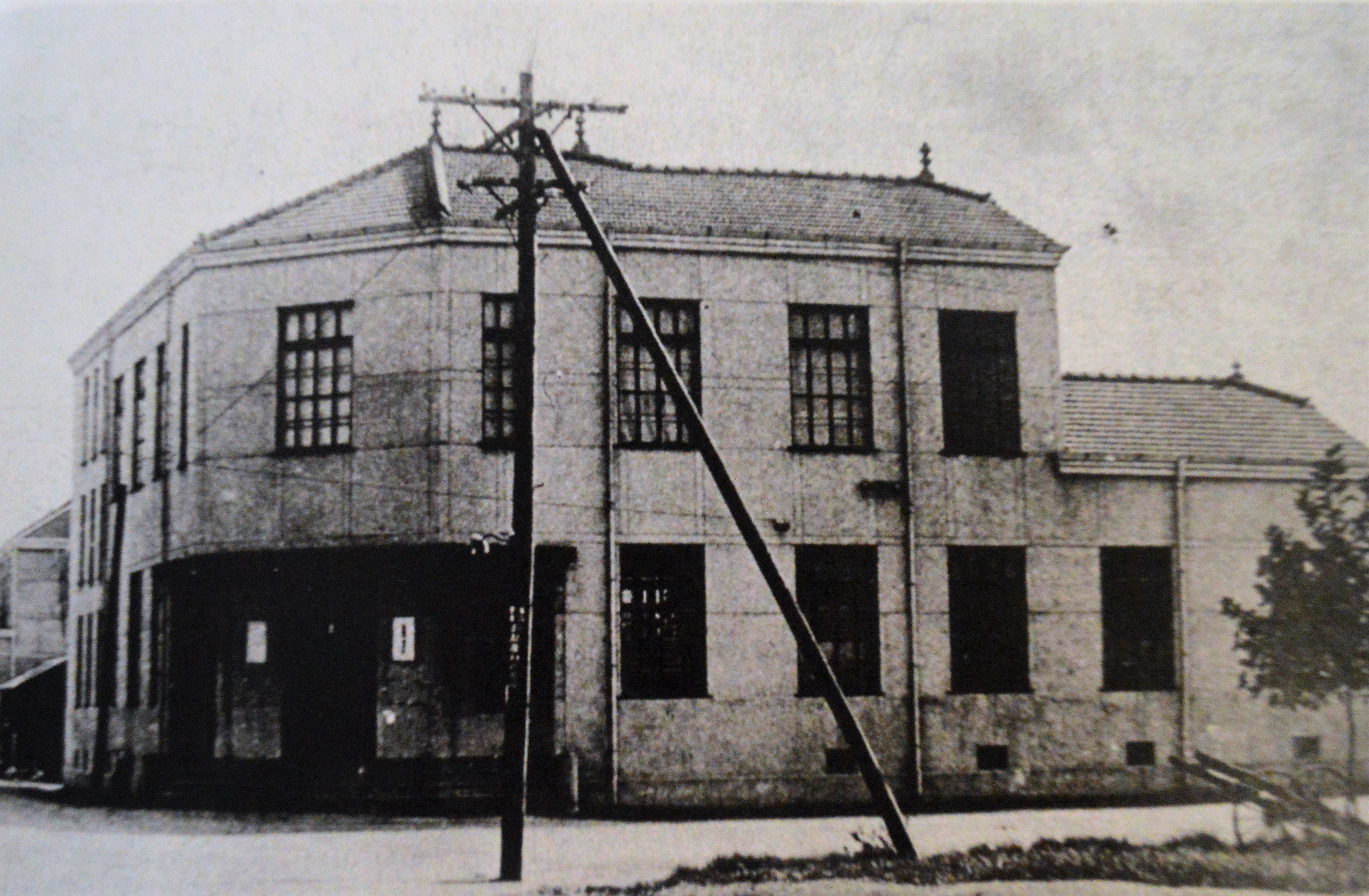 1930年に幸町に竣工・開館した丸亀市立図書館。開館当時。